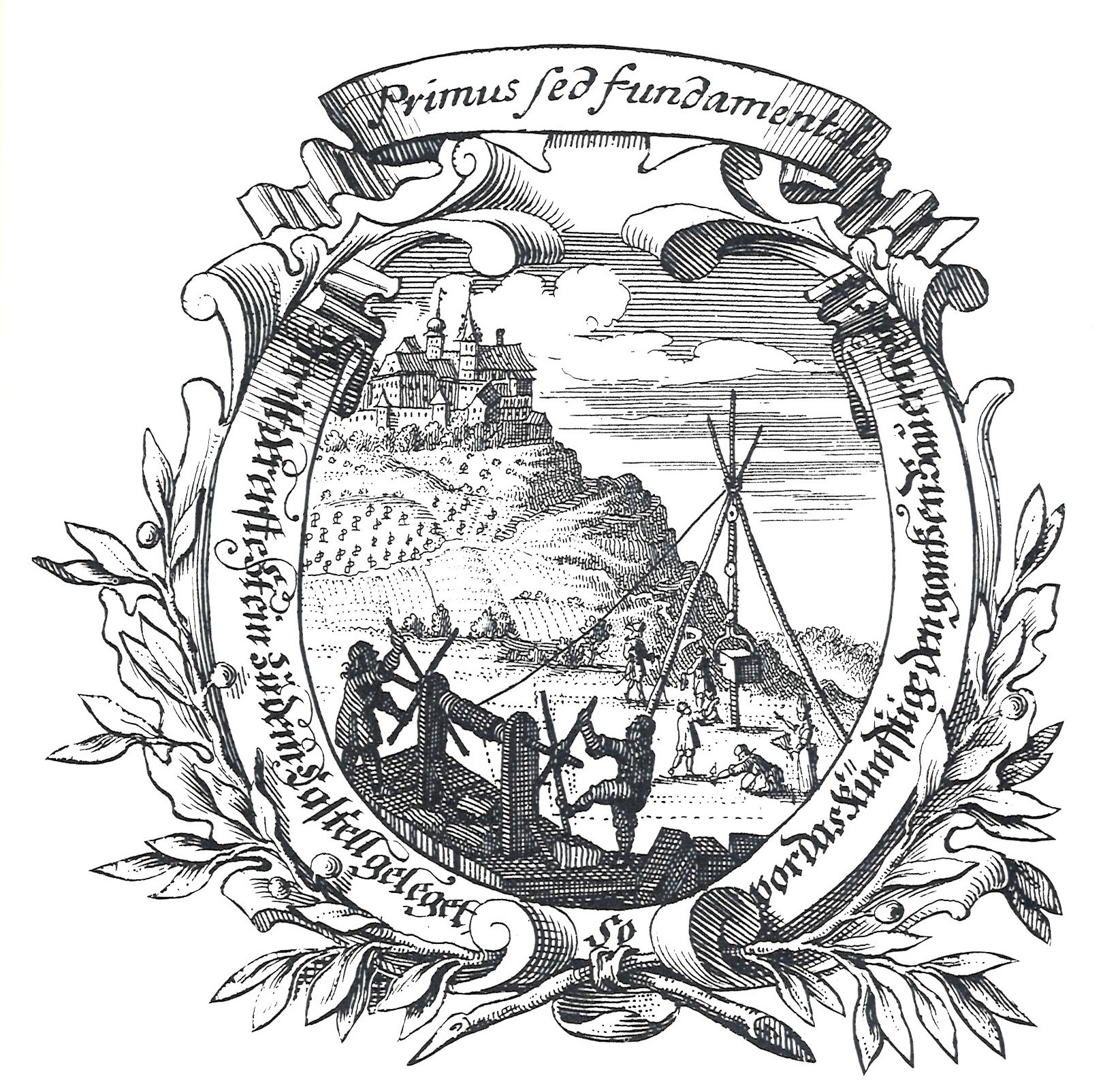 Detail des Titelkupfers der Leichenpredigt auf Graf Wolfgang Dietrich zu Castell. Ludwig Christoph Glotsch 1709, Nürnberg. "Grundsteinlegung Unteres Schloss"